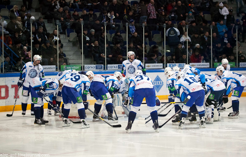 Динамо Минск перед матчем в Хабаровске 6 января 2012 г.